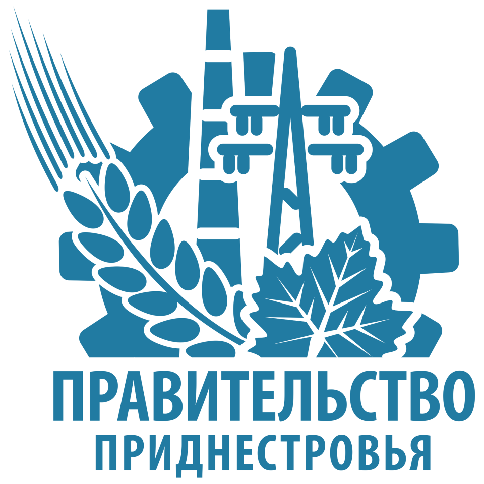 Эмблема Правительства ПМР (2013)